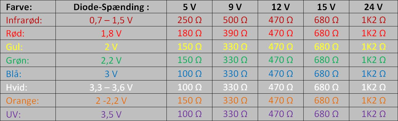 Diagram med formodstande til lysdioder med forskellig spændinger